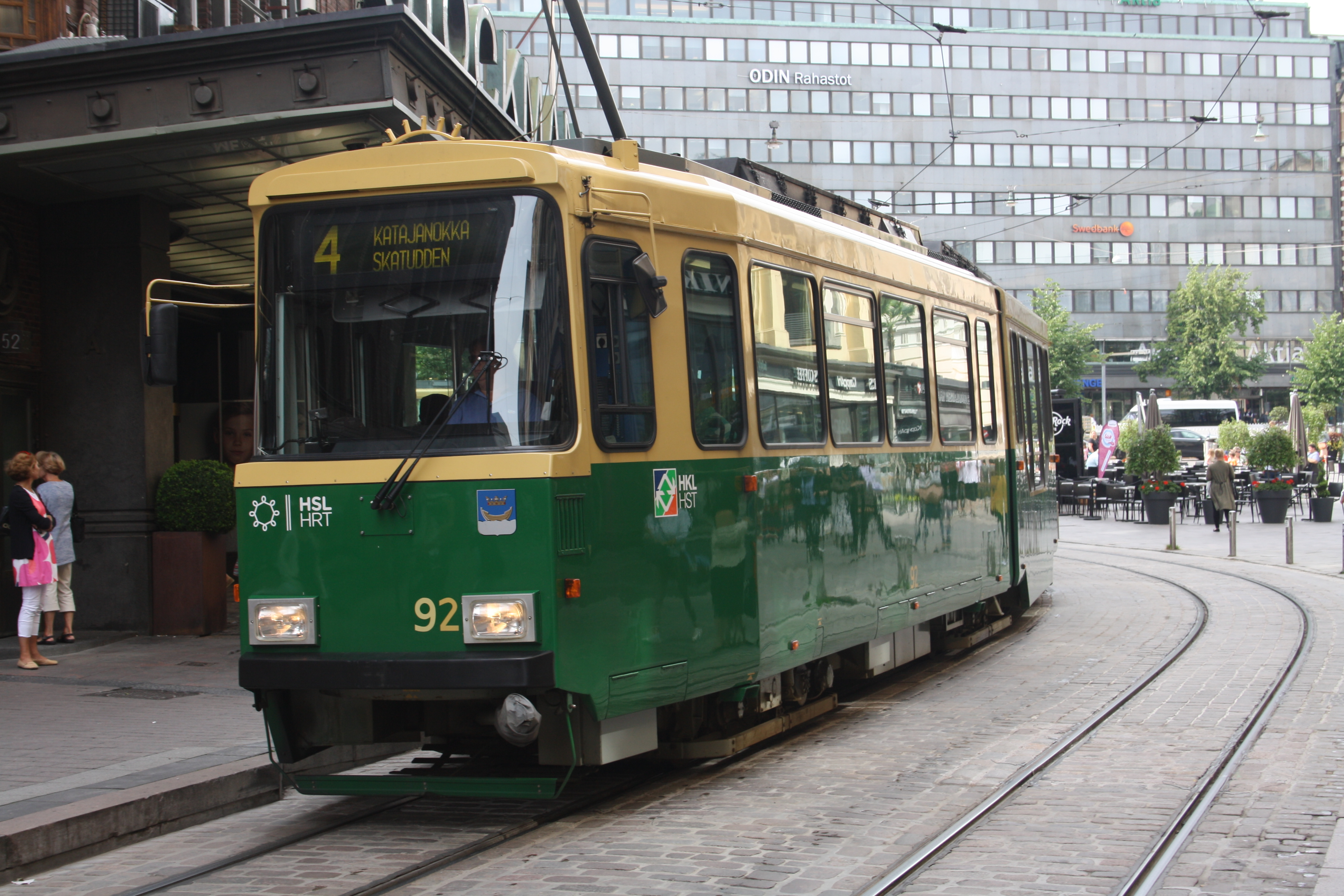 Spårvagn i Helsingfors